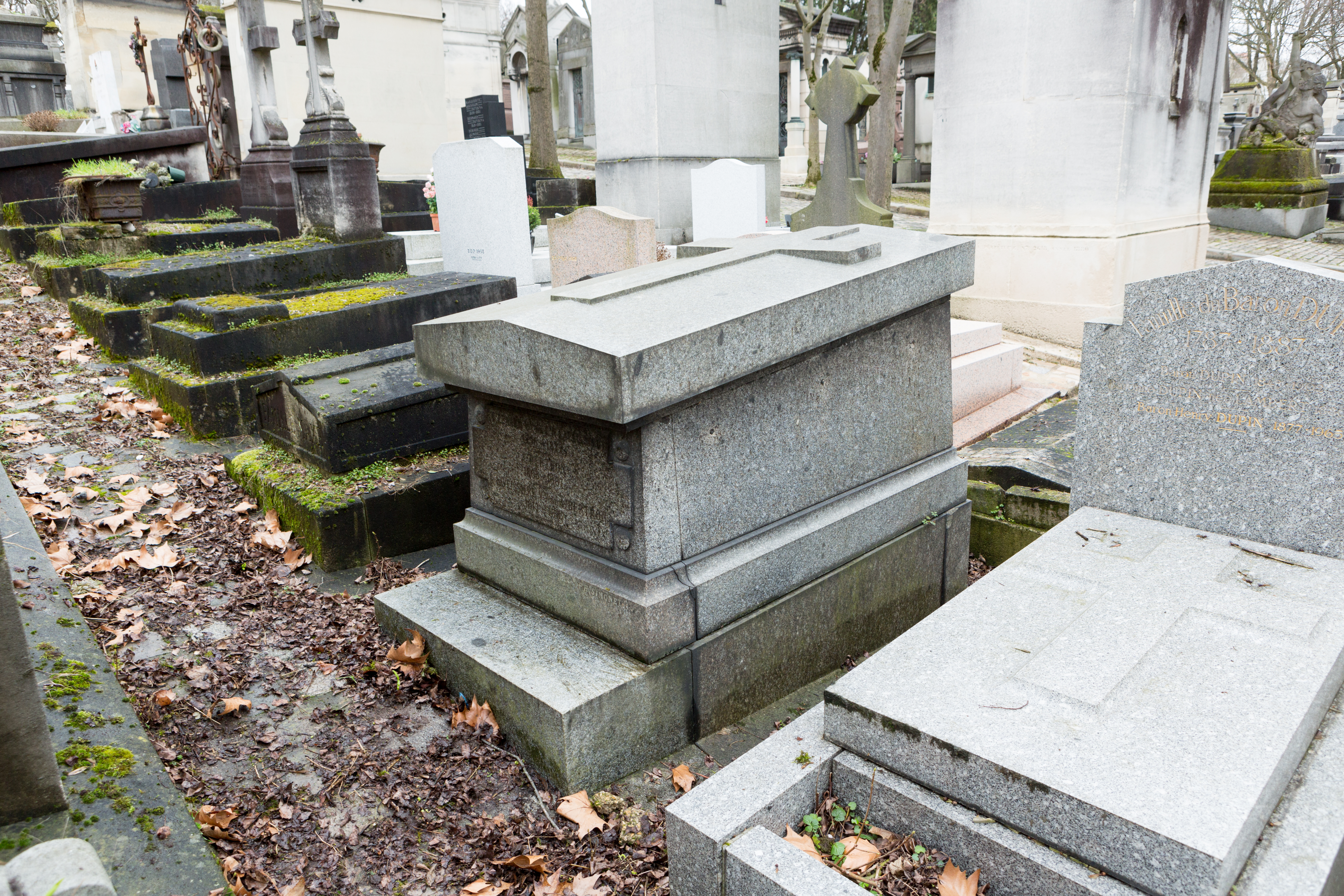 Sépulture d'Adolophe Bertron (1805-1887), négoociant qui se présenta à toutes les élections entre 1848 et 1885 sous l'étiquette de candidat humain. En 1877, il est élu au conseil municipal de Sceaux.